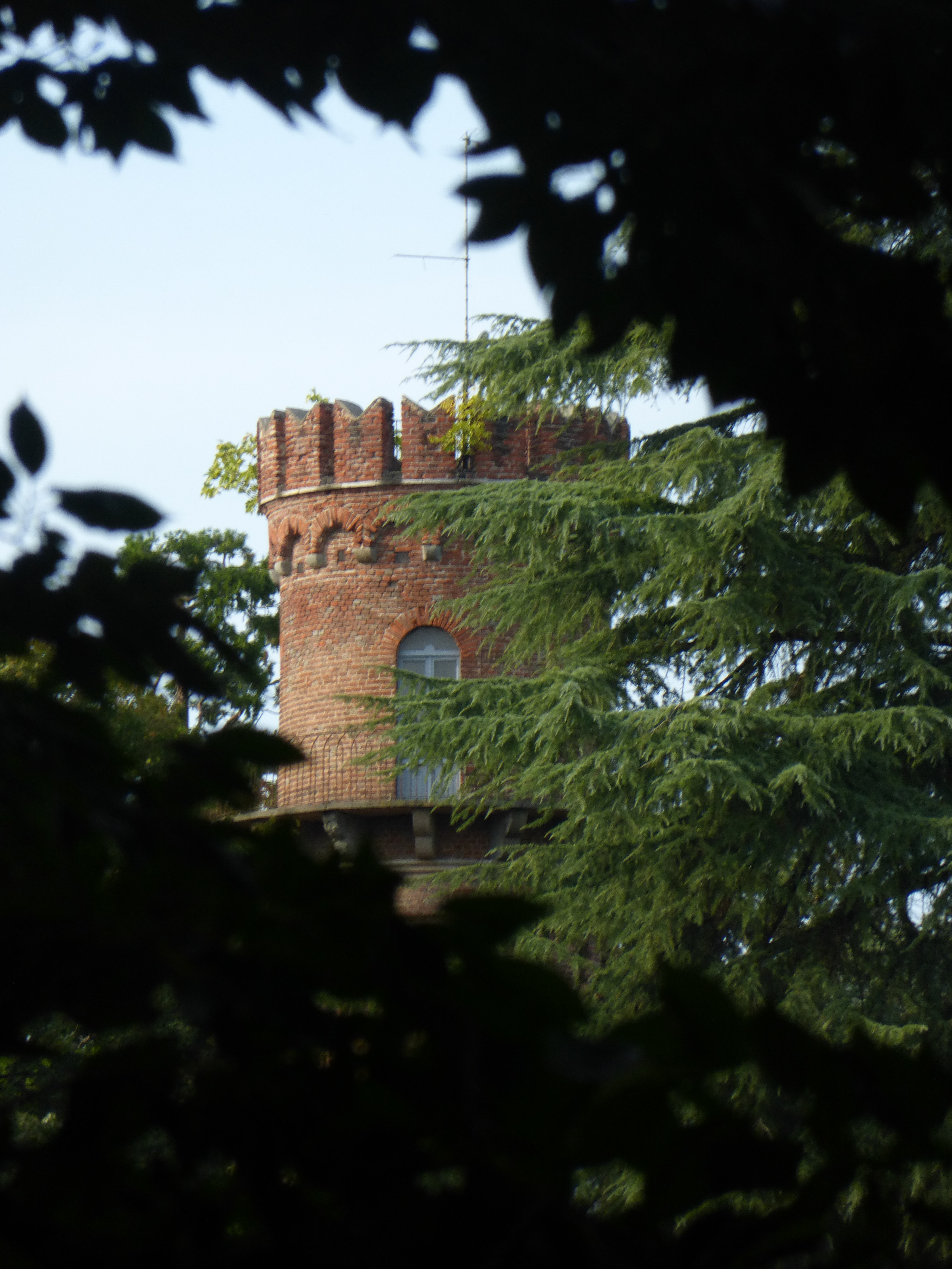 torretta dei Giardini Reali vista dall'intero del parco. This is a photo of a monument which is part of cultural heritage of Italy.